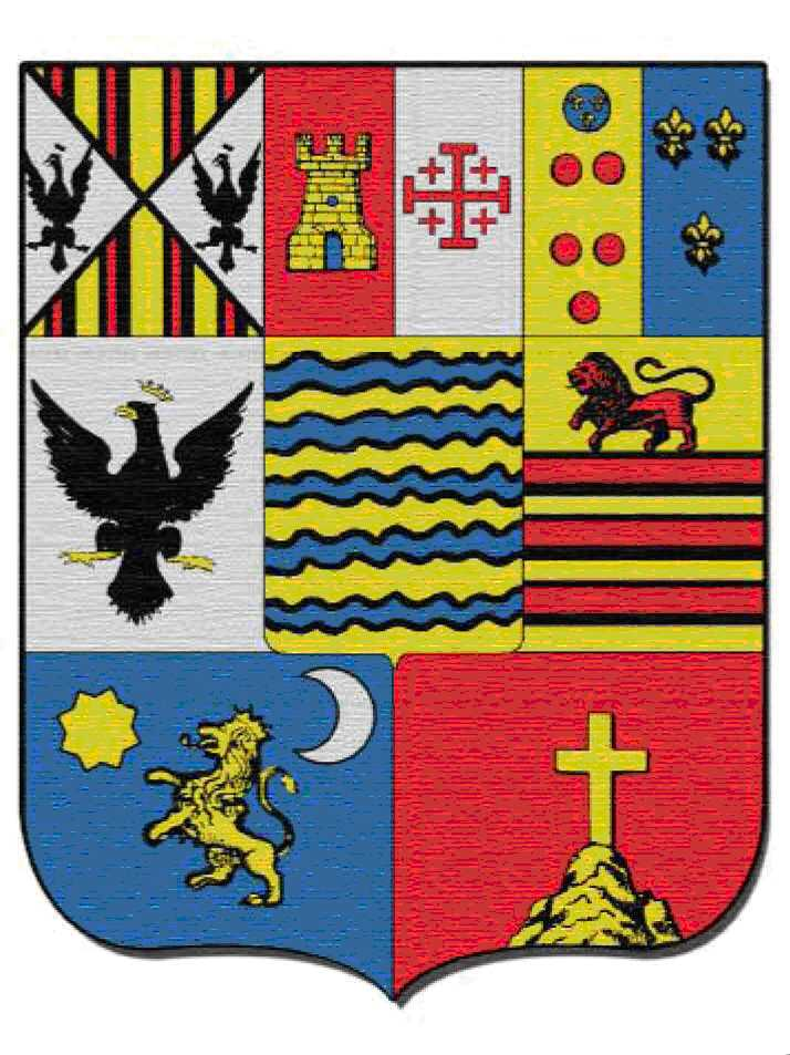 Stemma Stagno con alleanze